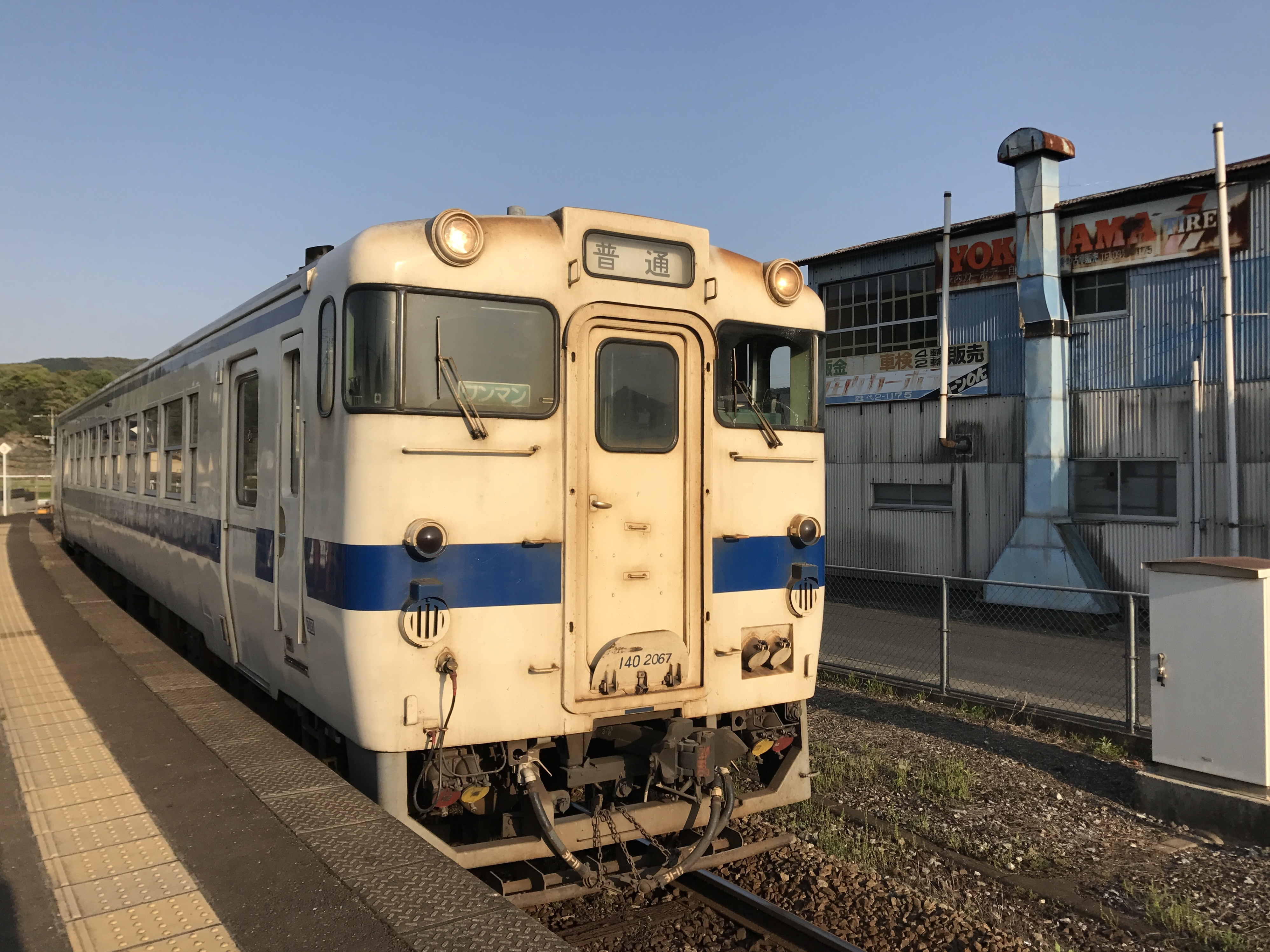 筑前庄内駅に到着する新飯塚行き後藤寺線列車